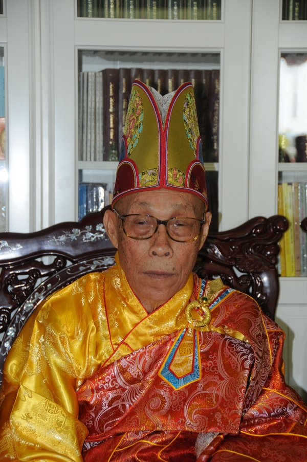 Photo du Vénérable Thich Minh Tâm